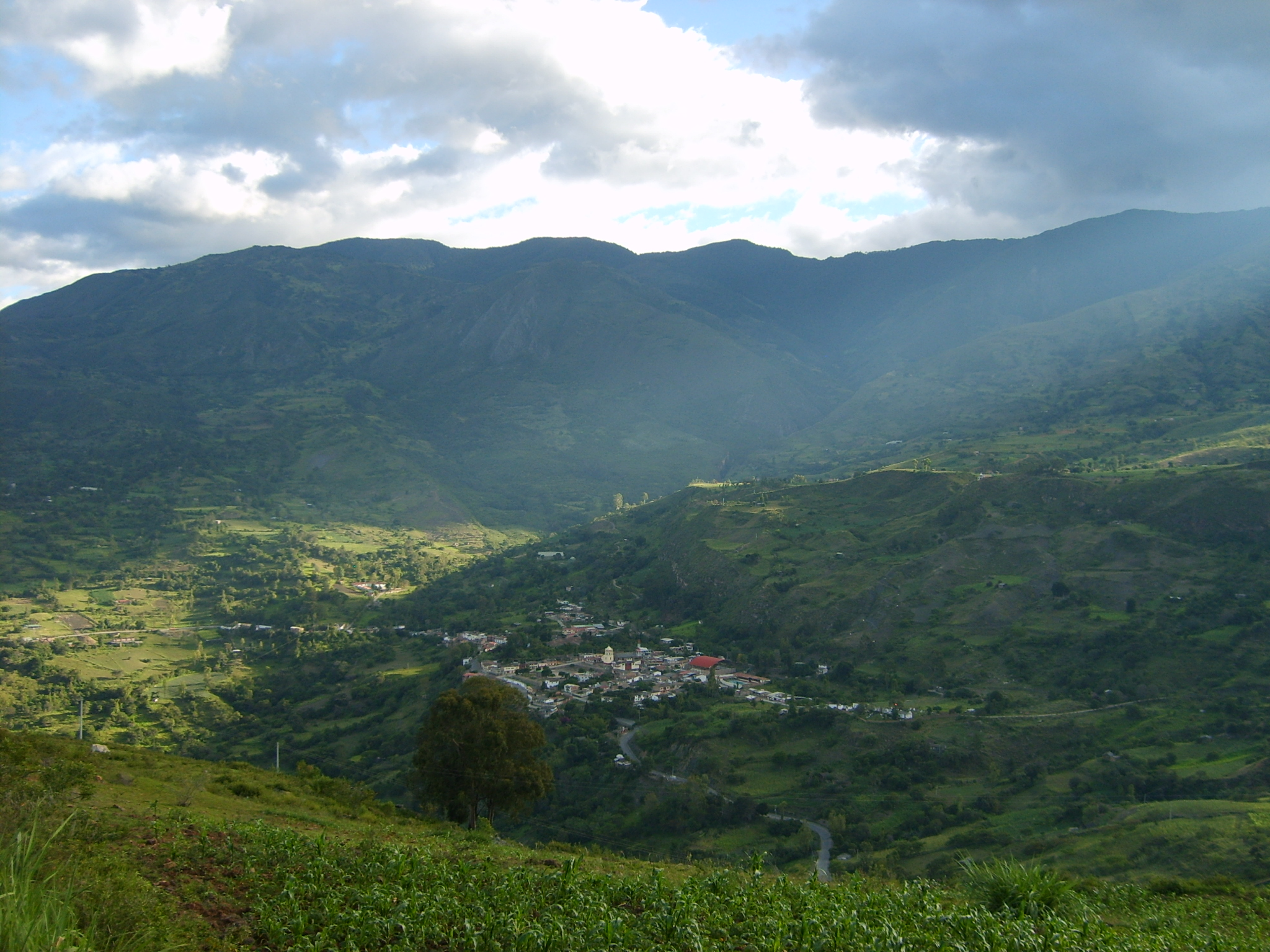 Tipacoque panoramica para